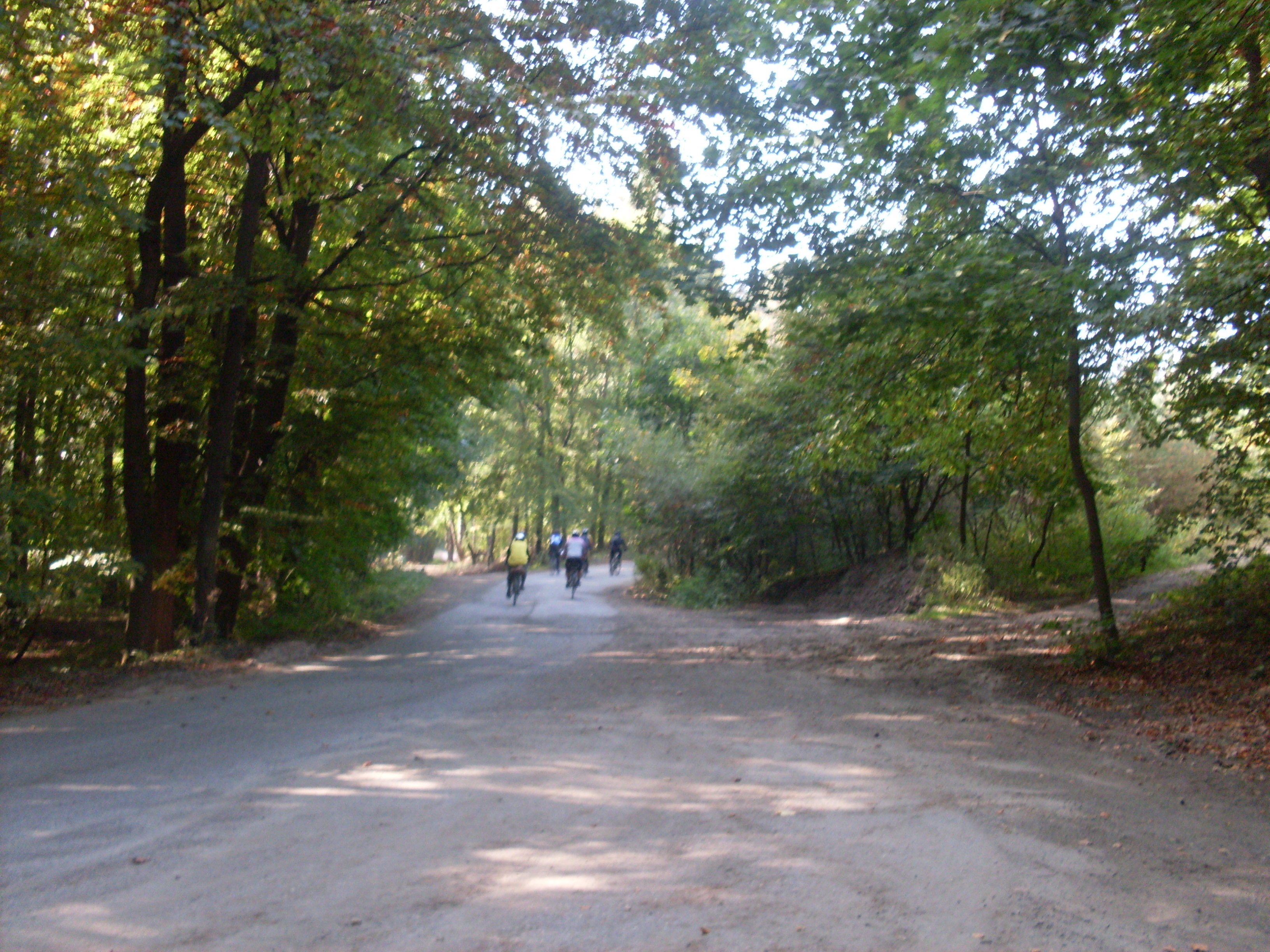 Droga Krakowska w Lesie Zwierzyniec (okolice:Zalas-Tataruchy) na Grzbiecie Tenczyńskim